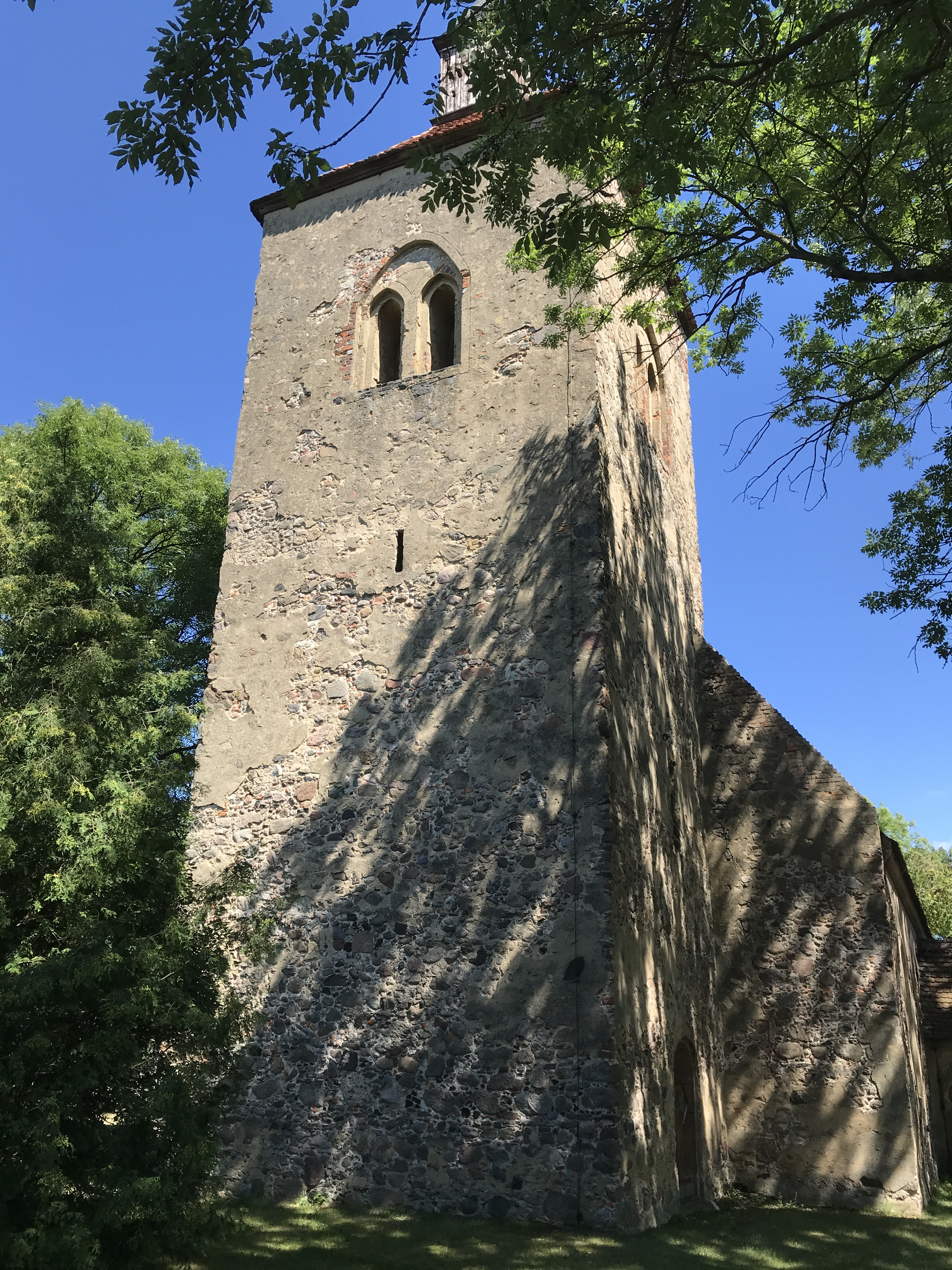 Die Dorfkirche in Groß Leine ist eine Saalkirche, die im Kern im 15. Jahrhundert errichtet wurde. Von 1906 bis 1910 erfolgte ein umfassender Umbau, bei dem auch die Vorhallen im Norden, Süden und Osten hinzukamen.